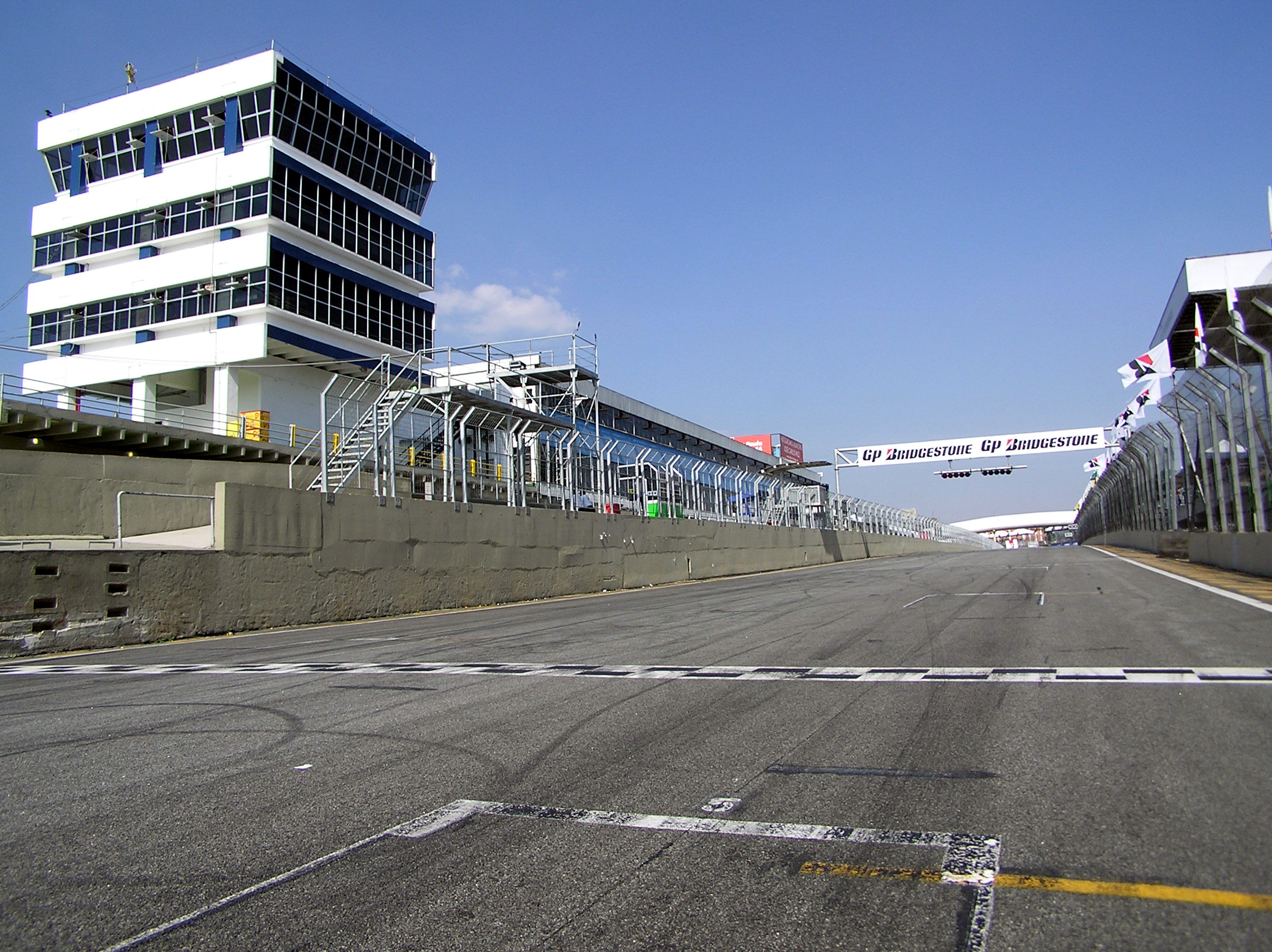 Autódromo José Carlos Pace: Main straight